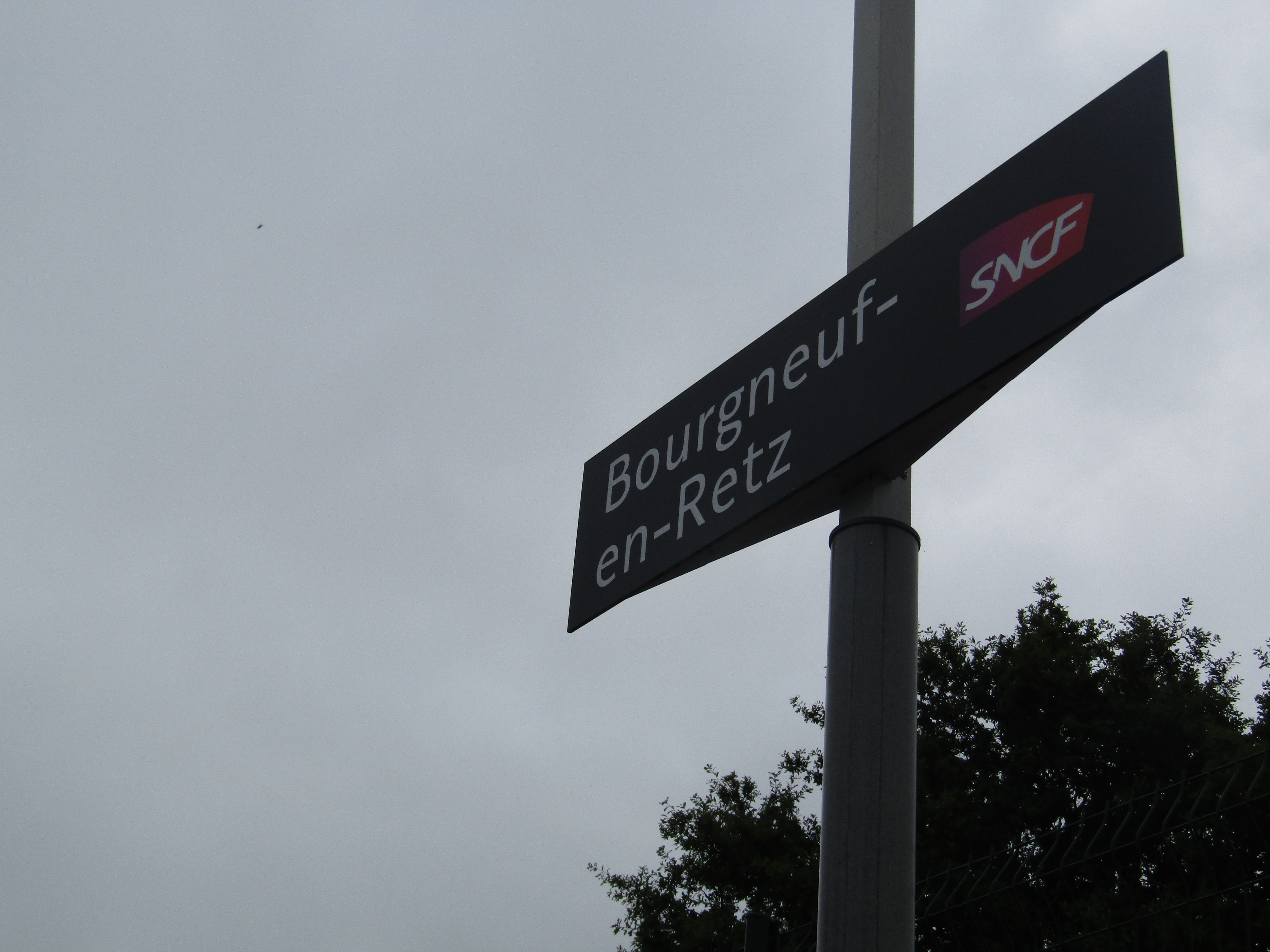 Gare de Bourgneuf-en-Retz, signalétique